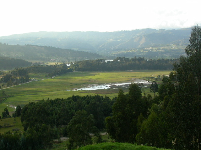 Pantano de Vargas